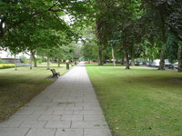 Rubislaw Terrace Gardens, Aberdeen, Scotland Category:Aberdeen